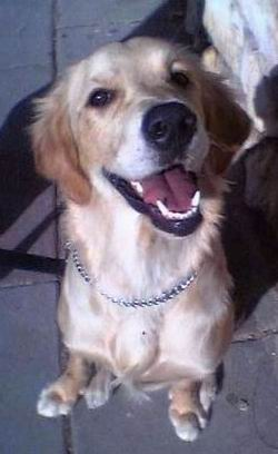 Golden Retriever